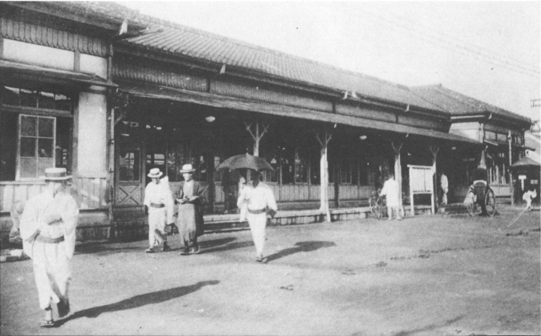 大正初期の関西本線亀山駅。参宮線(現・紀勢本線)の分岐駅であり、大きな駅舎が建てられた。